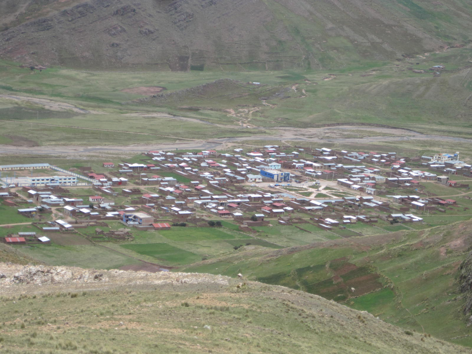 CENTRO POBLADO DE LARIMAYO DISTRITO DE ANTAUTA, MELGAR, PUNO, PERÚ